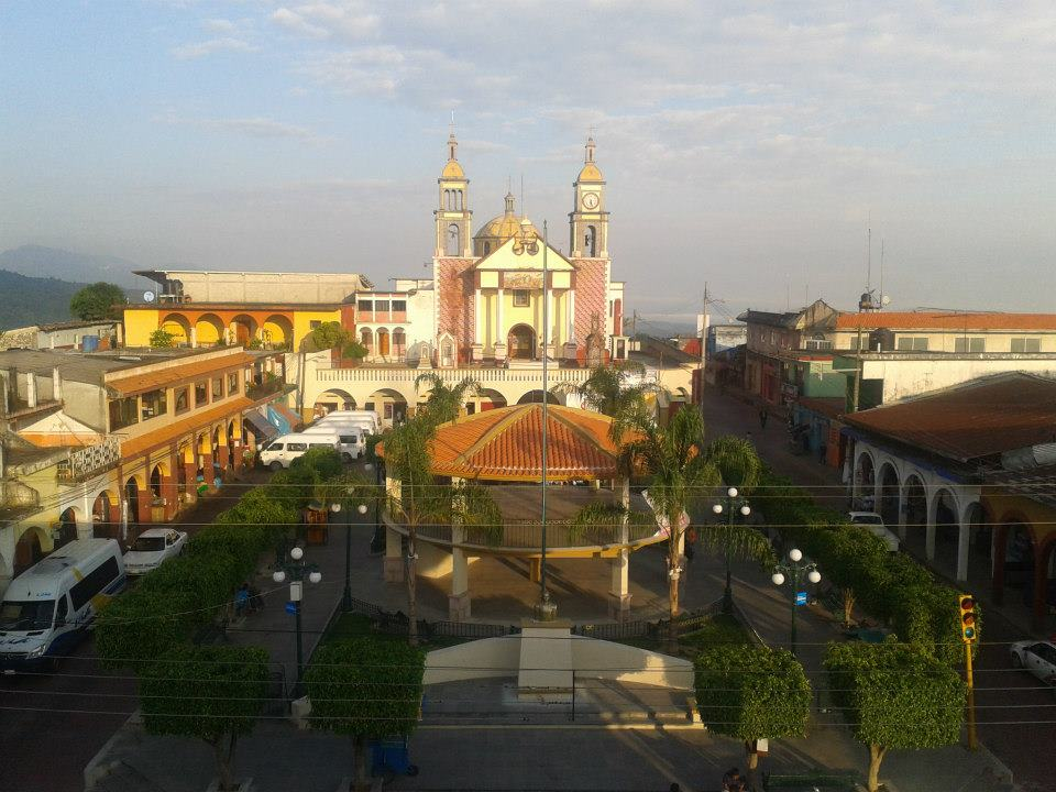 Plaza de Hueytamalco